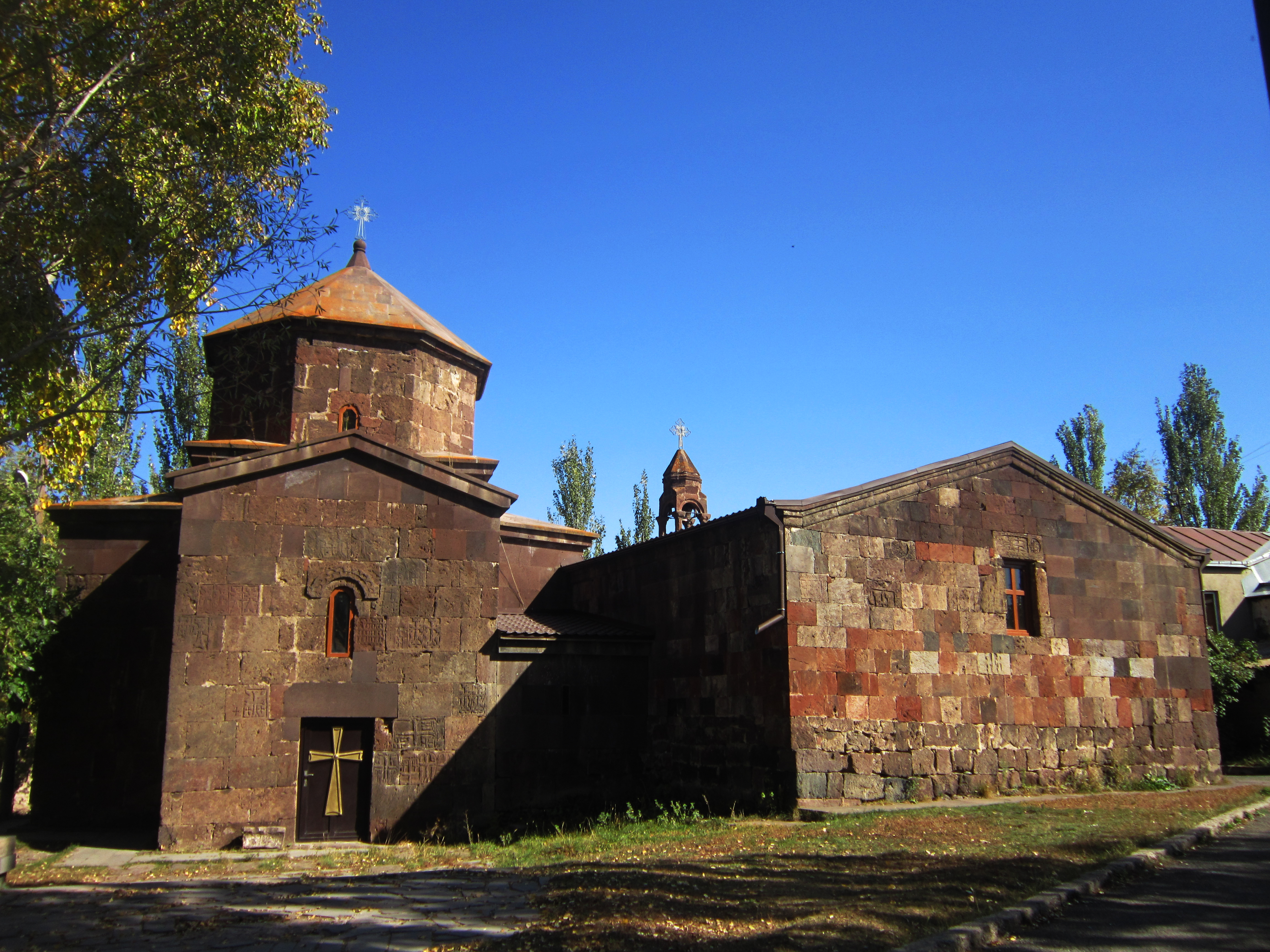 Եկեղեցական համալիր Հացառատի Սբ. Աստվածածին և Սբ. Գրիգոր Լուսավորիչ եկեղեցիներըː Առնեղի վանք 1/18